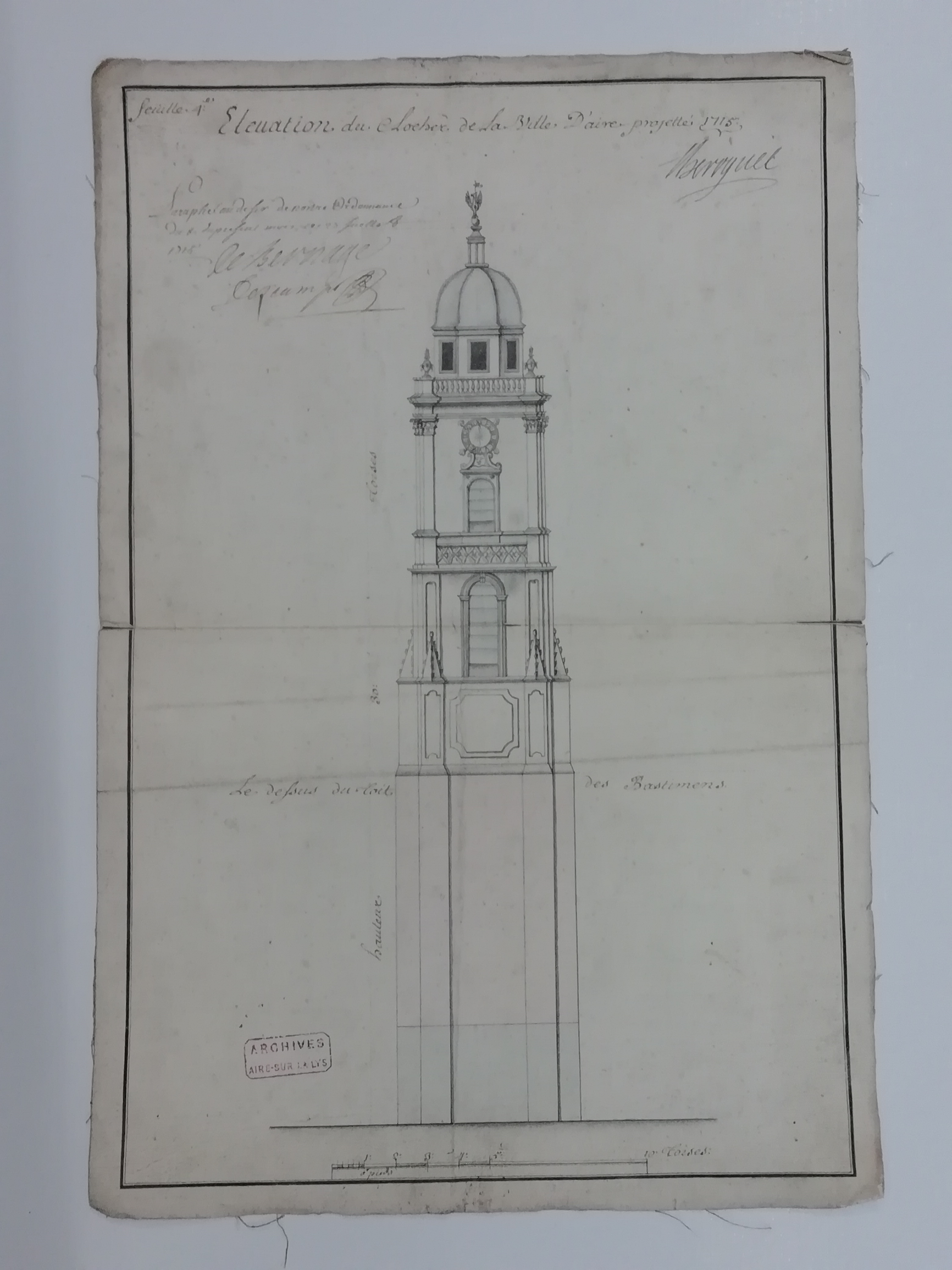 Archive datant de 1715